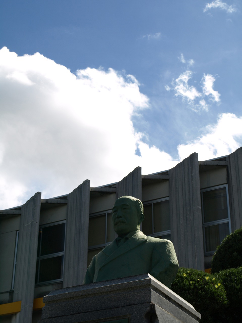 佐々友房先生像